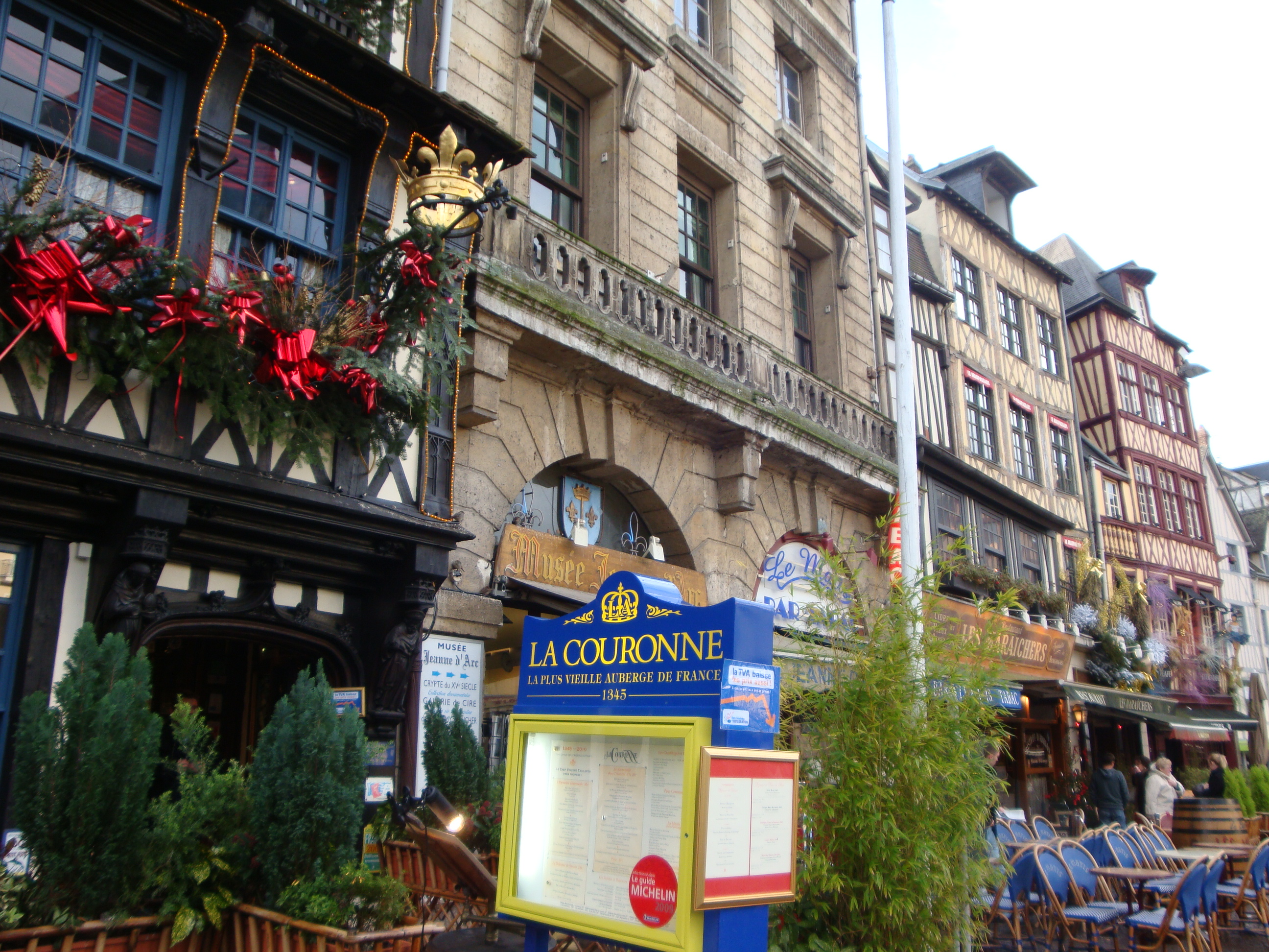 restaurant La Couronne